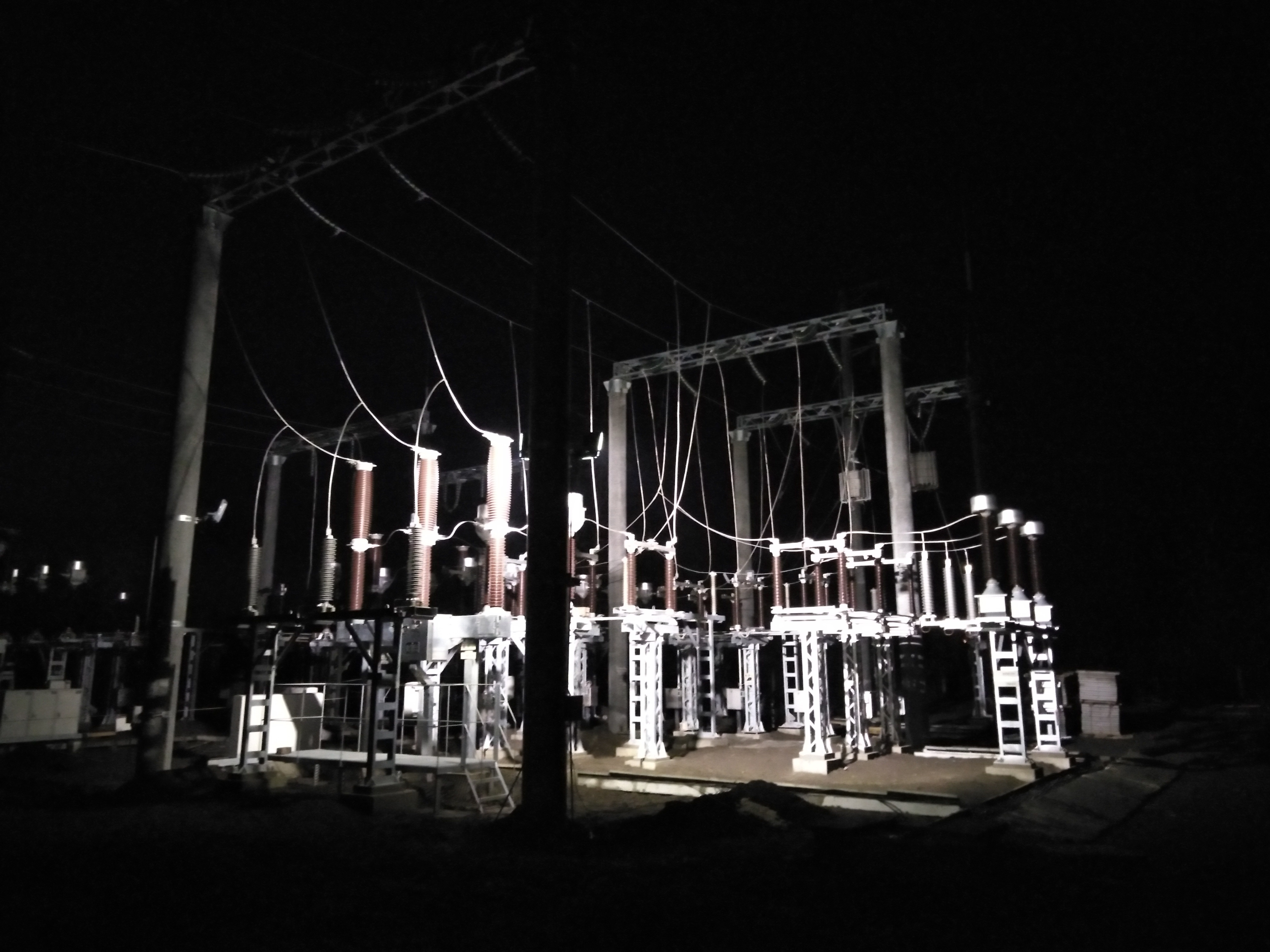 Україна. Полтавська область. Підстанція "Полтаваобленерго" ПС 110/10 кВ "Хорол". ВРУ-110 кВ.